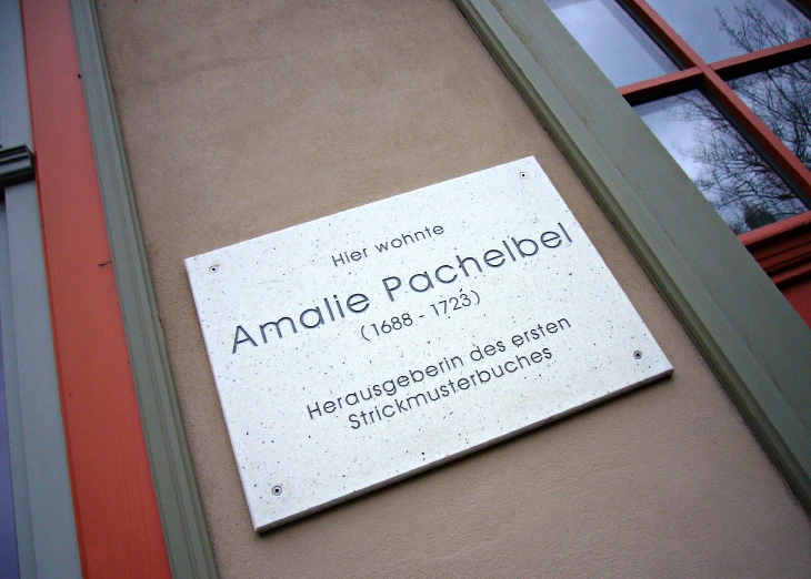 Gedenktafel Amalie (sic) Pachelbel